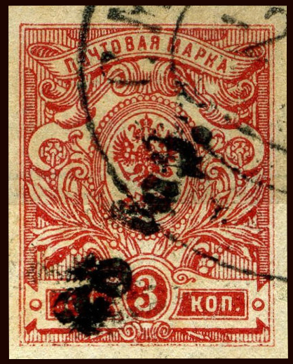 Провизорий Смилтене (Латвия)